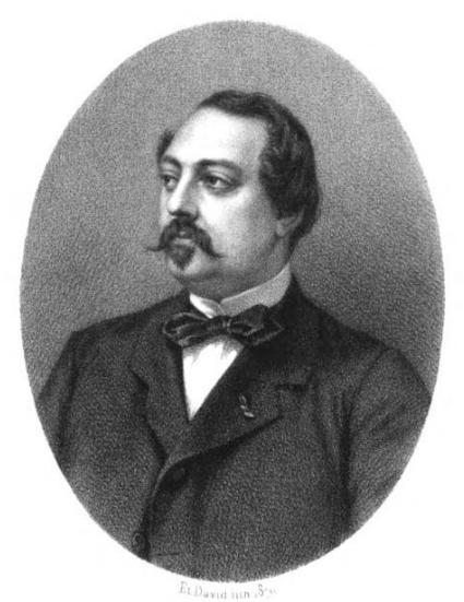 "Ernest Gellibert des Seguins - Président de la Société archéologique et historique de la Charente et de la Société d'agriculture, sciences, art et commerce de ce département - Député au Corps législatif - Membre du Conseil général, administrateur des Hospices, Chevalier de la Légion d'honneur, etc. - Né à Toulouse le 27 février 1825, Mort à Champrose (Charente) le 2 octobre 1868."